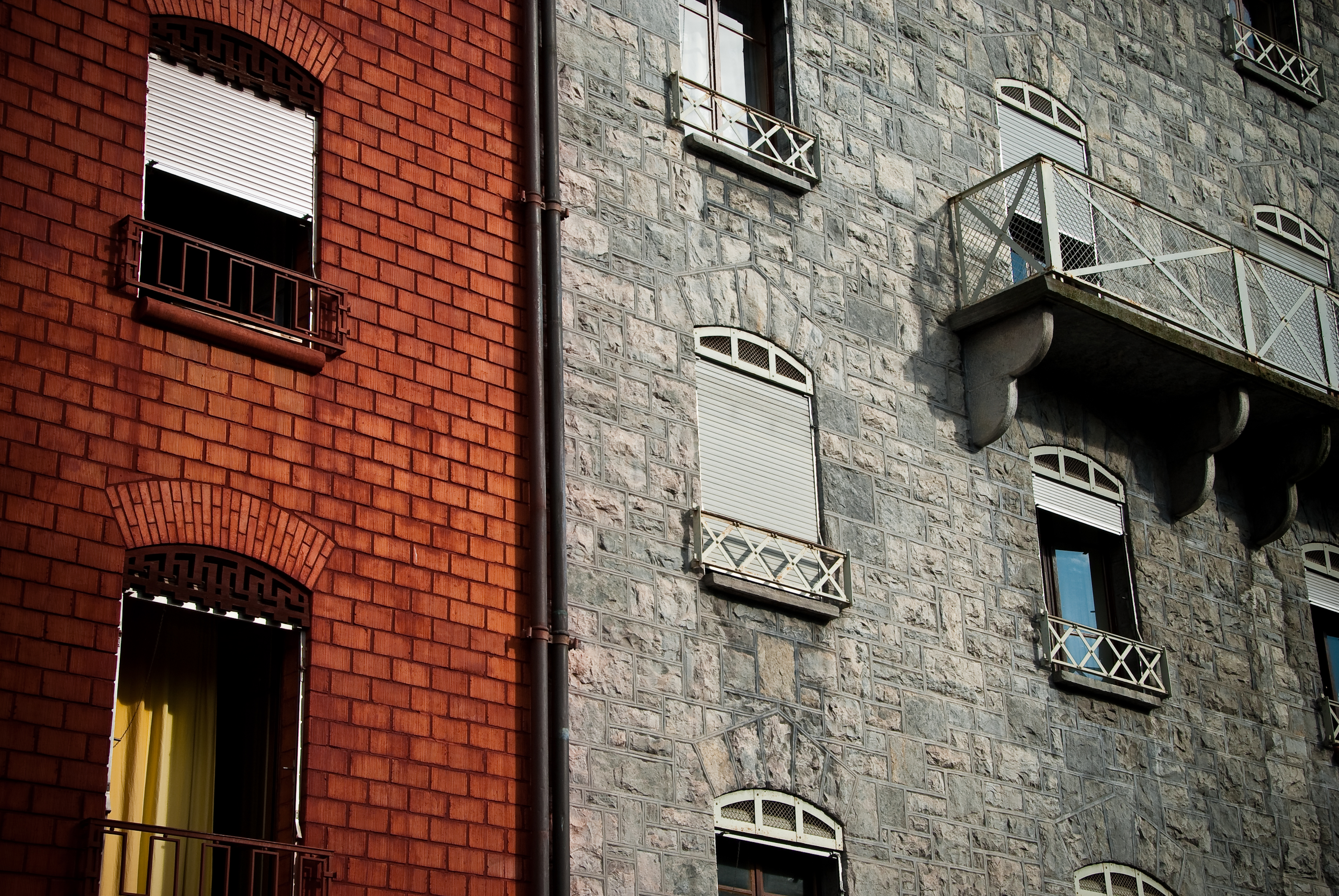 32 Rue des Grottes, Geneva